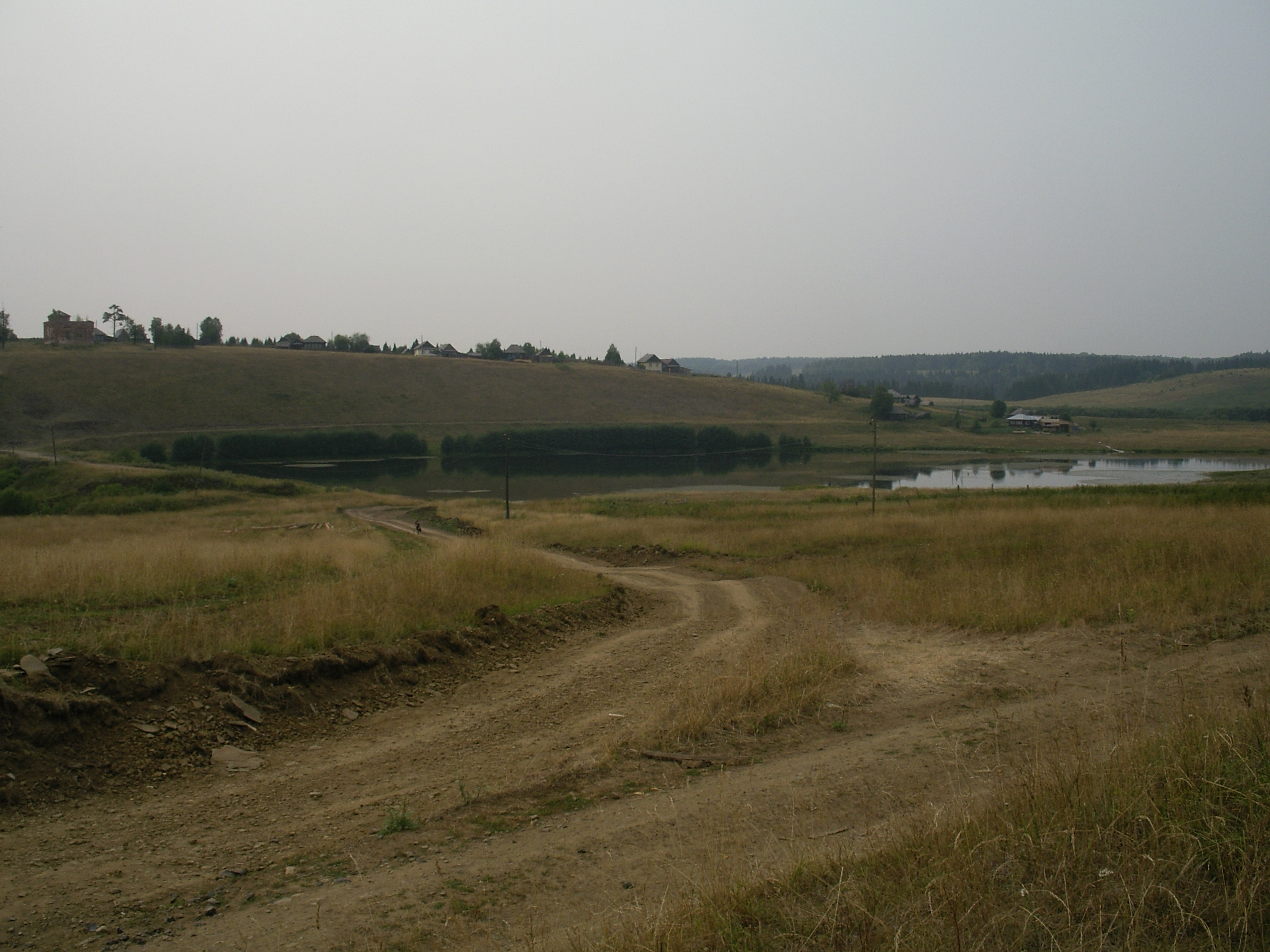 Остатки Молебского пруда